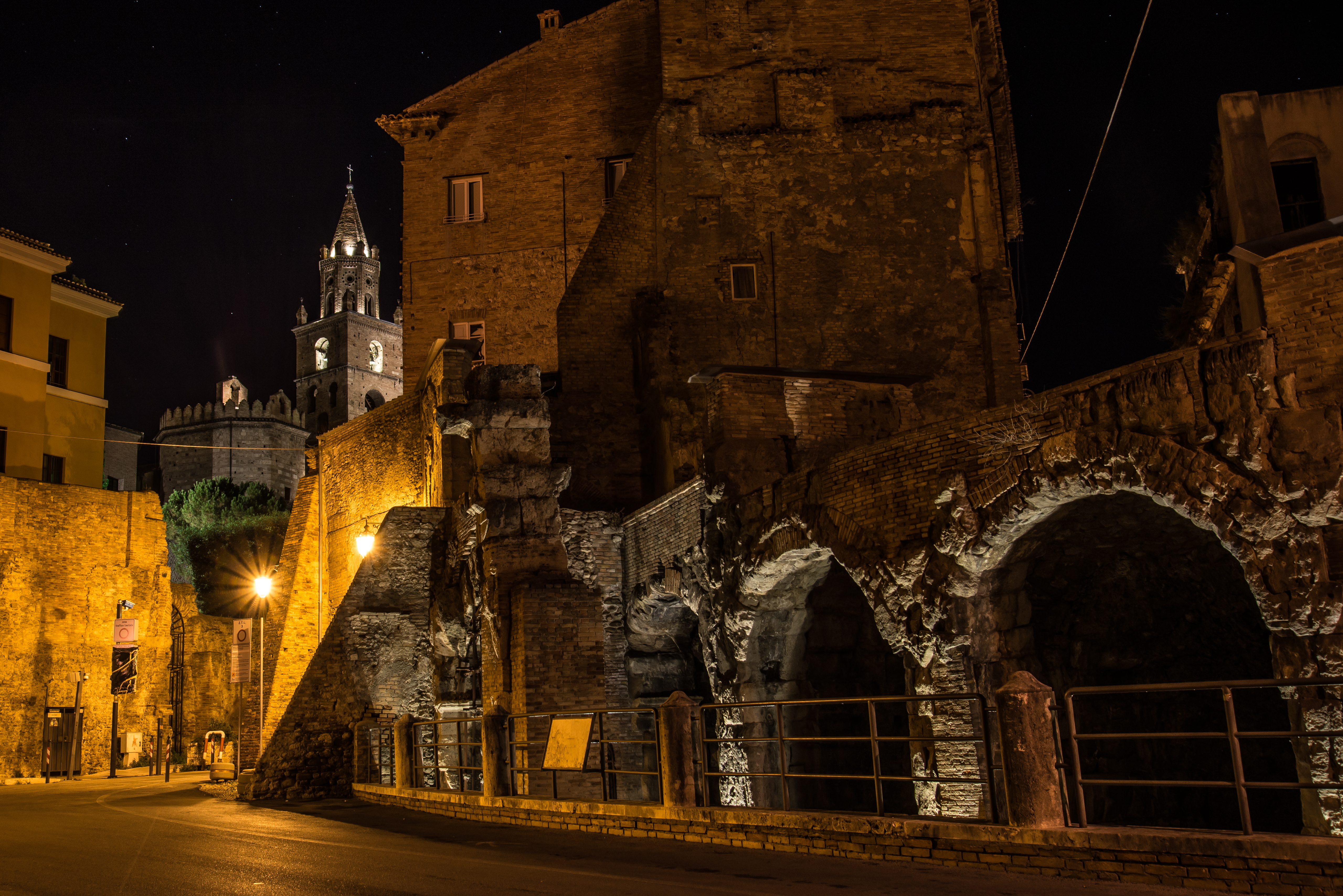 Teramo, Torre del Duomo e Teatro romano in notturna